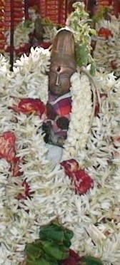 Kootruva nayanar, Murti nayanar, Tirunilanakka nayanar, Uruttira Pasupati nayanar